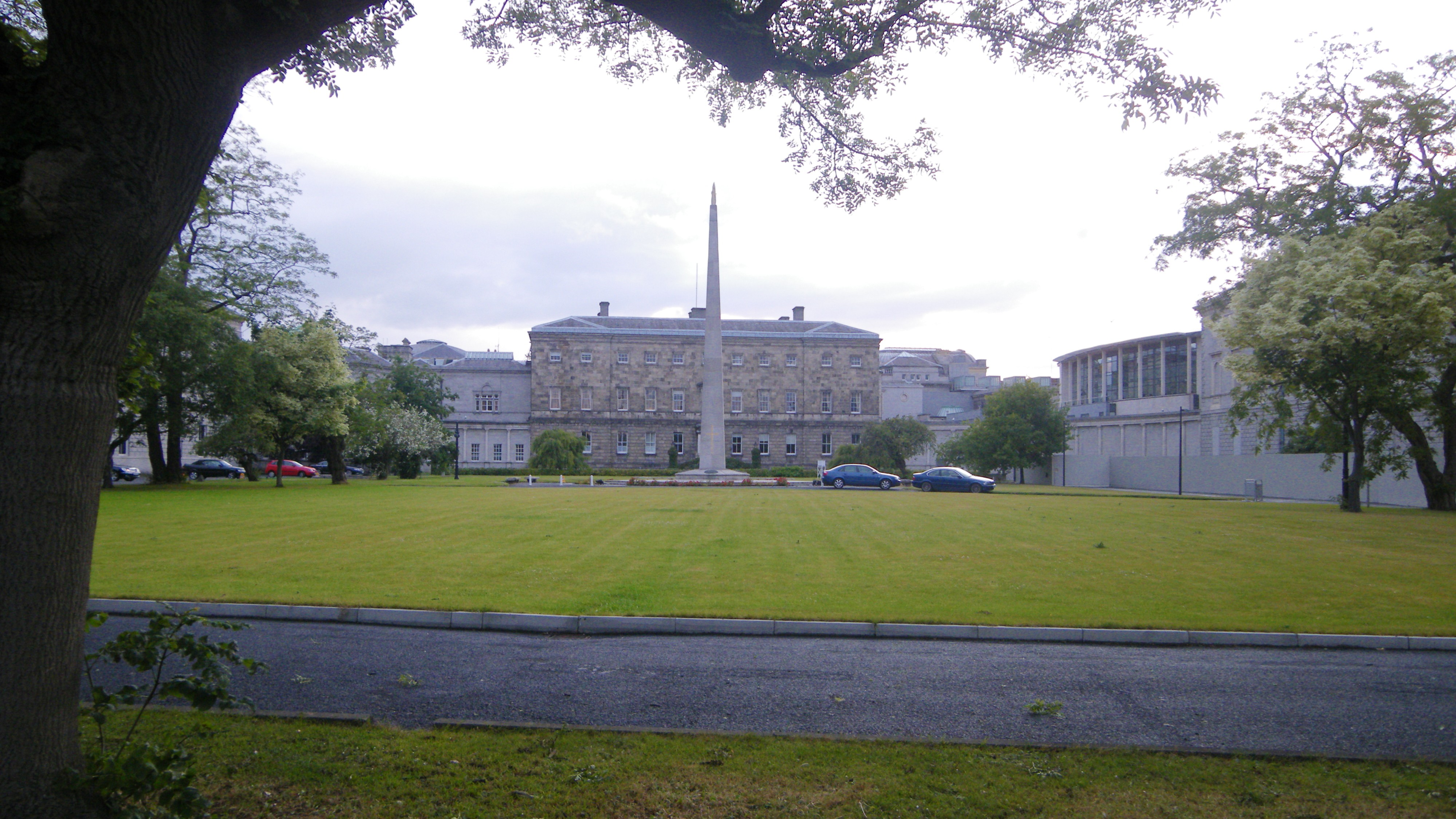 Leinster House vue du coté de Merrion Square, siège du parlement de la République d'Irlande.